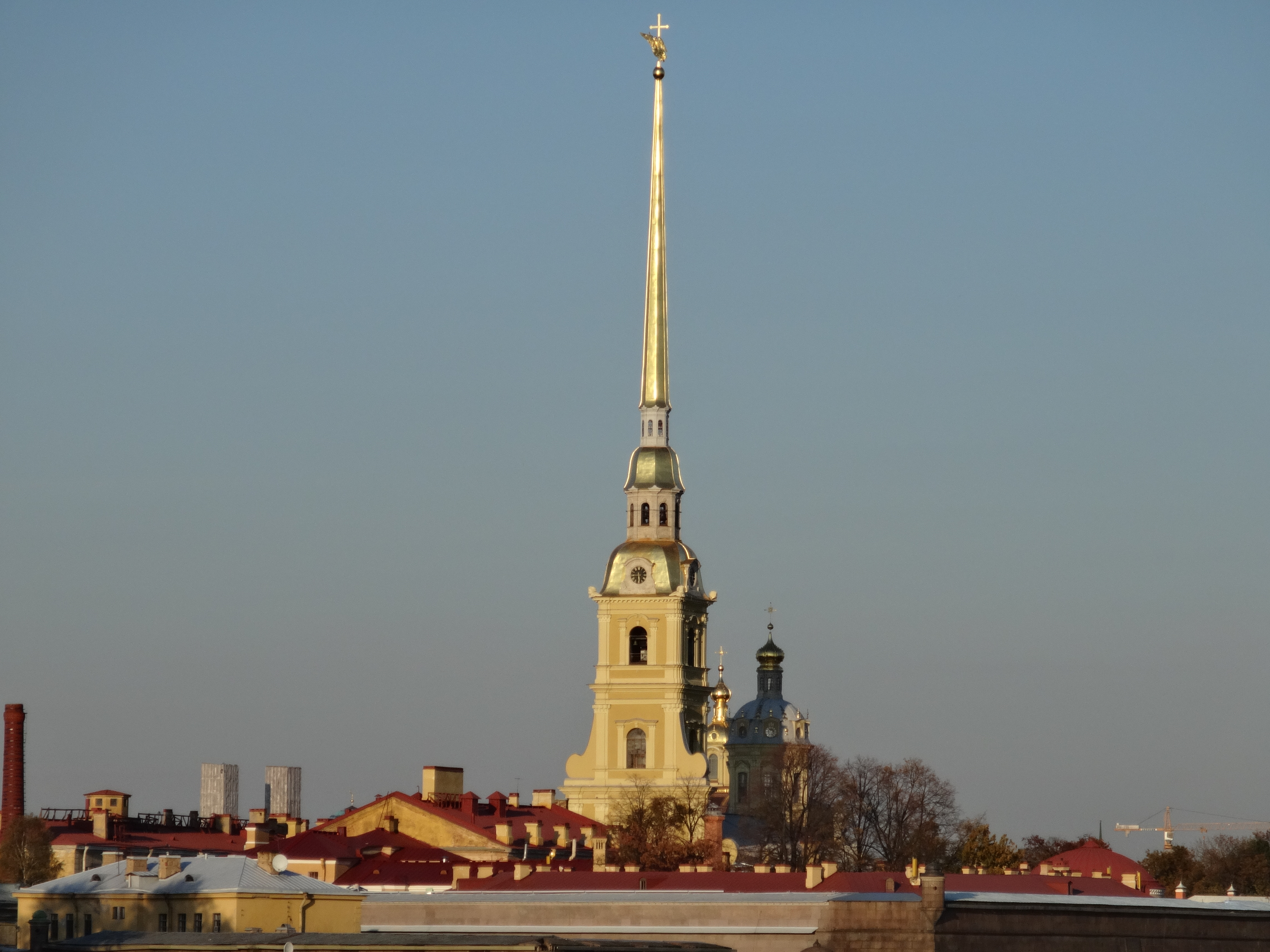 Петропавловская крепость (Санкт-Петербург, о. Заячий, Петропавловская крепость)